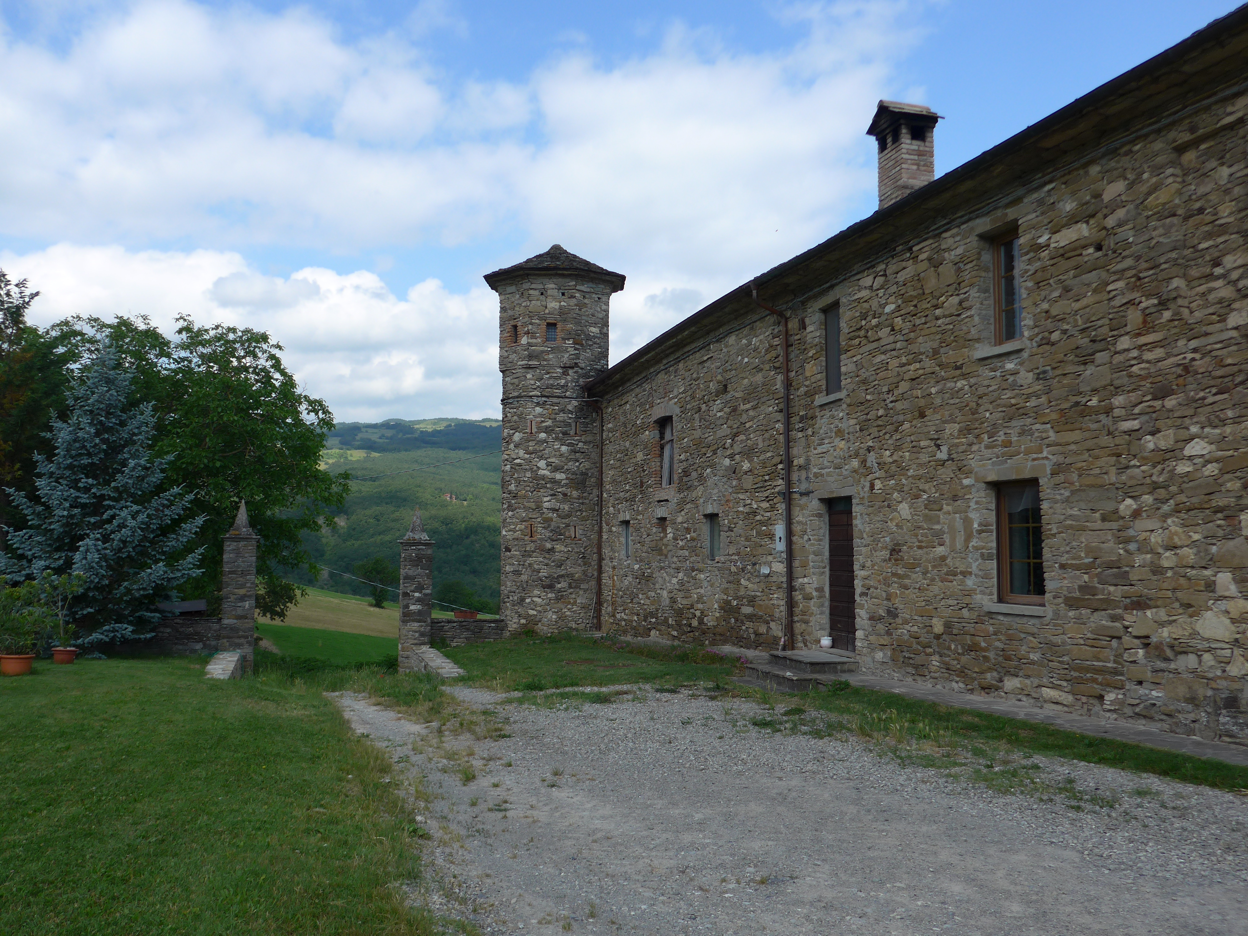 Varsi, castello di Golaso.